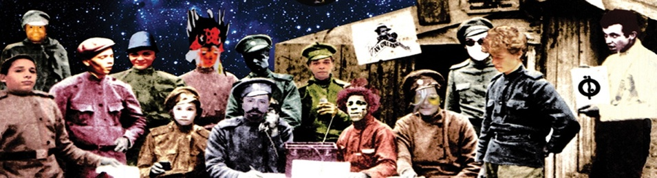 Mabuses_banner.jpg